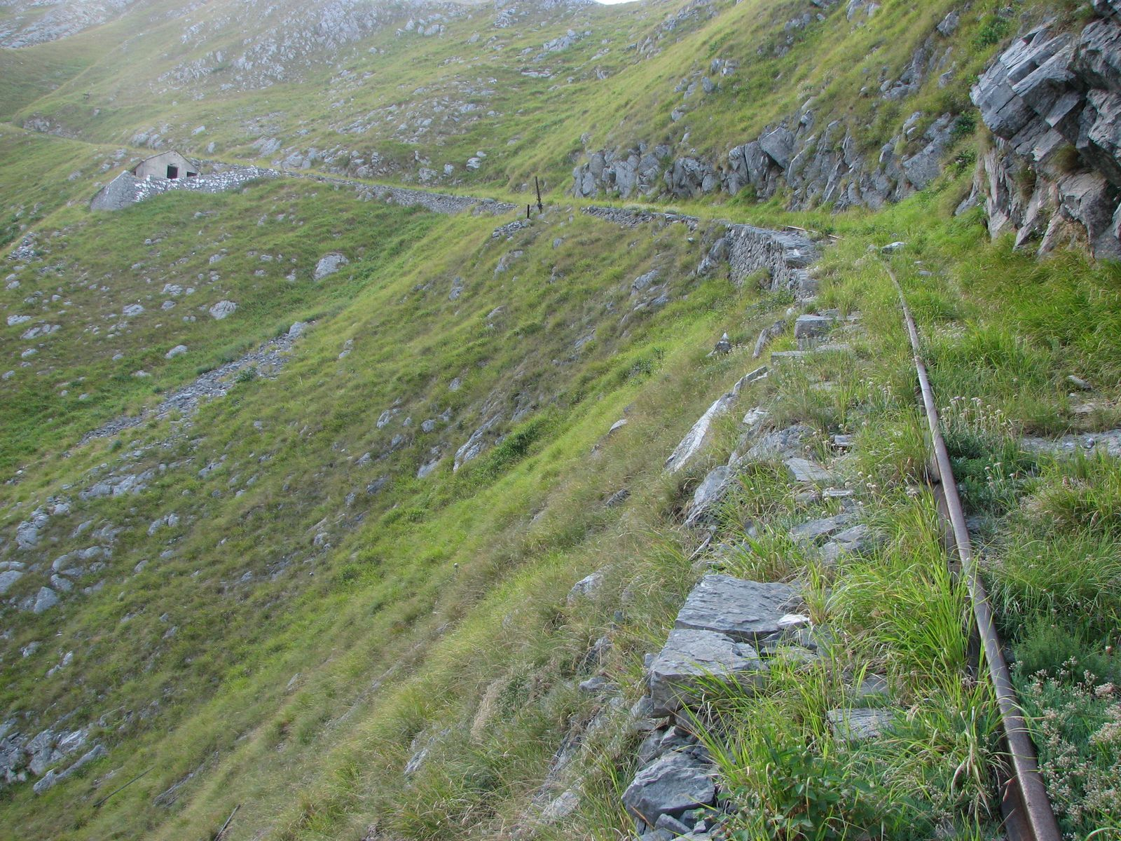 Sulla parte alta della lizza di Piastreta, Alpi Apuane - Italia.